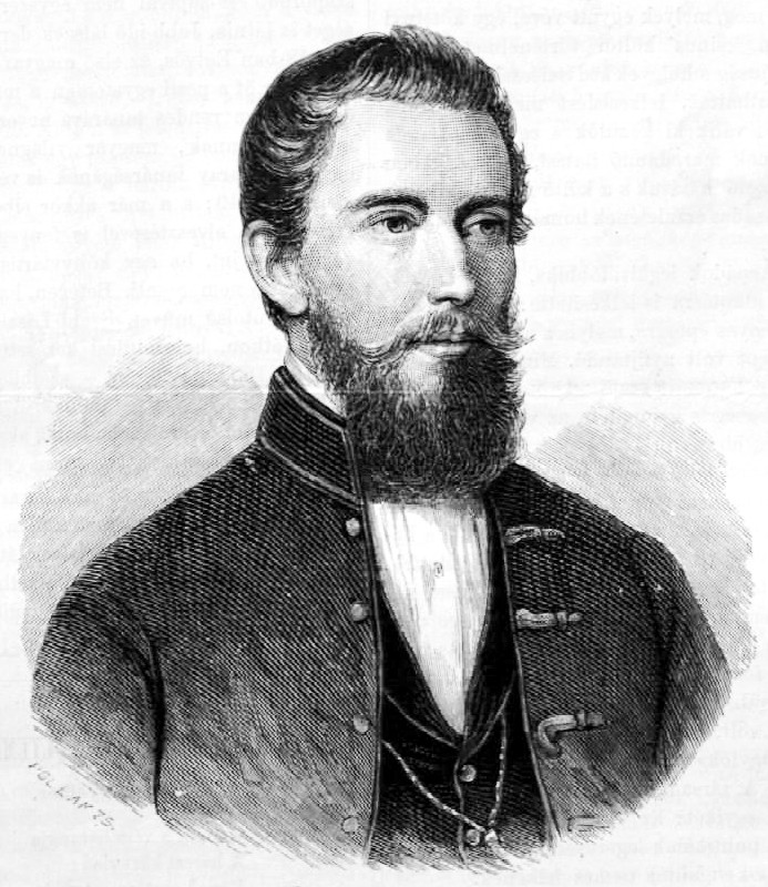 Garay János (1812–1853) írő, költő, a Magyar Tudományos Akadémia levelező tagja portréja. Pollák Zsigmond metszete